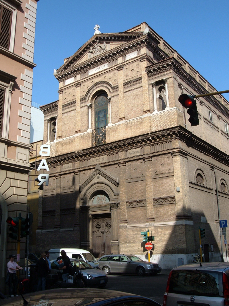 Chiesa di Santa Maria del Rosario di Pompei, a Roma, nel rione Castro Pretorio. Foto personale.